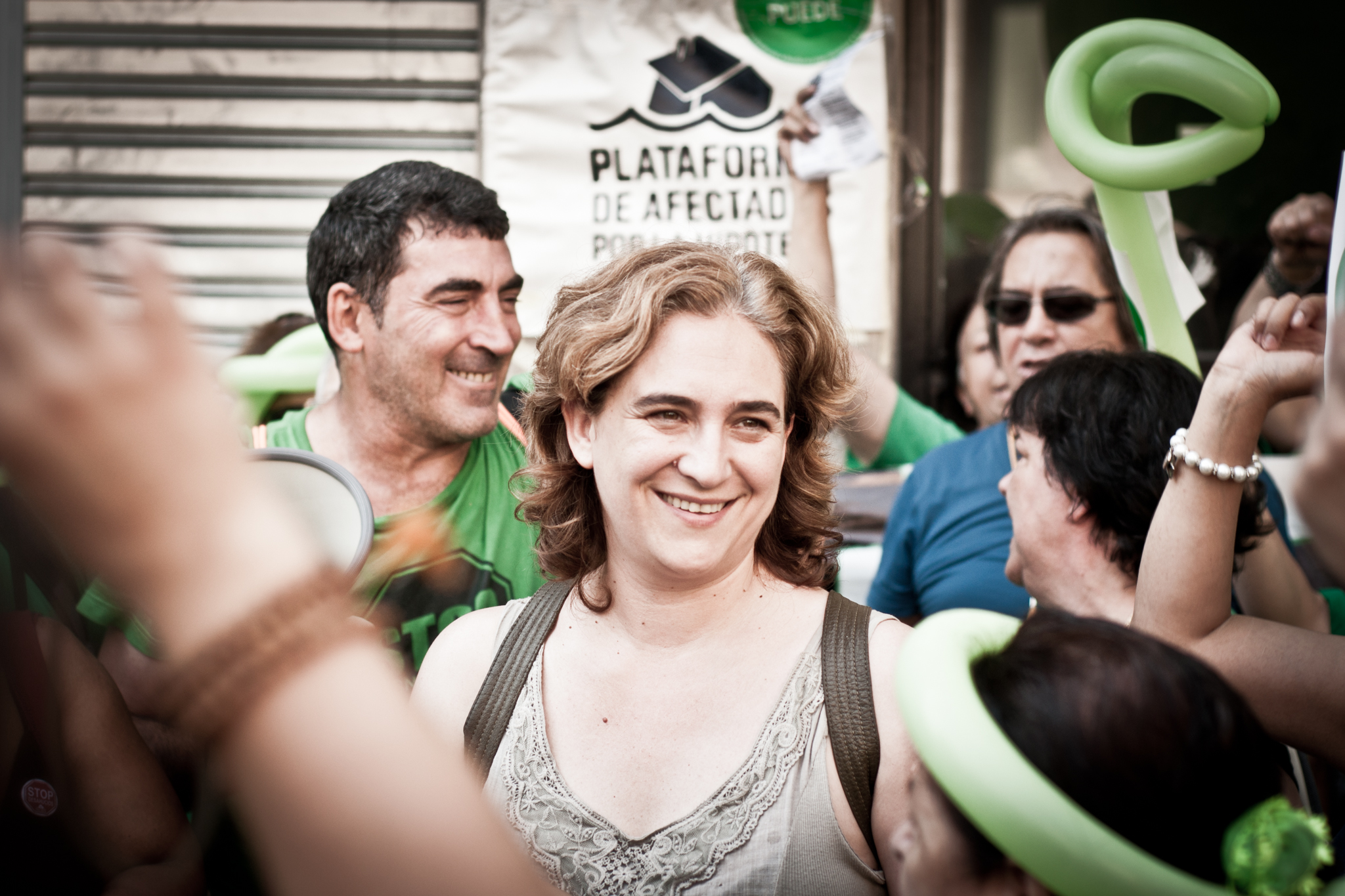 Ada Colau al termine del discorso in cui spiegava l'obiettivo della manifestazione.